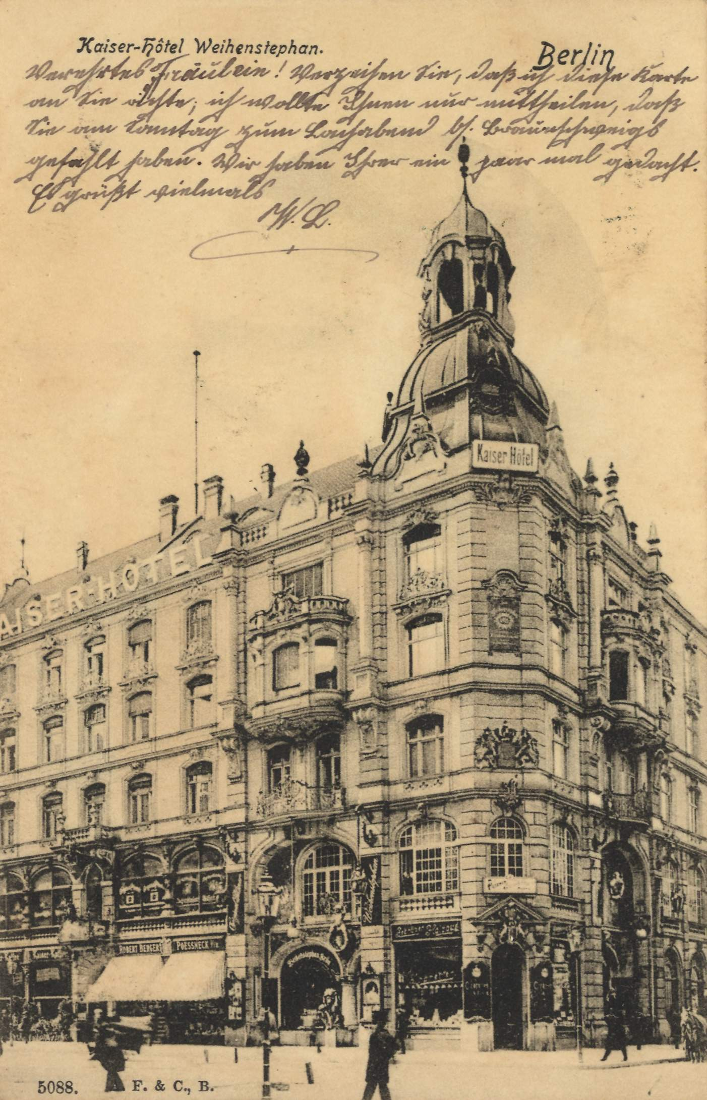 Kaiser-Hotel, Friedrichstraße 176-177 (südwestliche Ecke zur Jägerstraße) in Berlin-Mitte. Heute steht hier das 1984 eröffnete Haus der Sowjetischen Wissenschaft und Kultur.